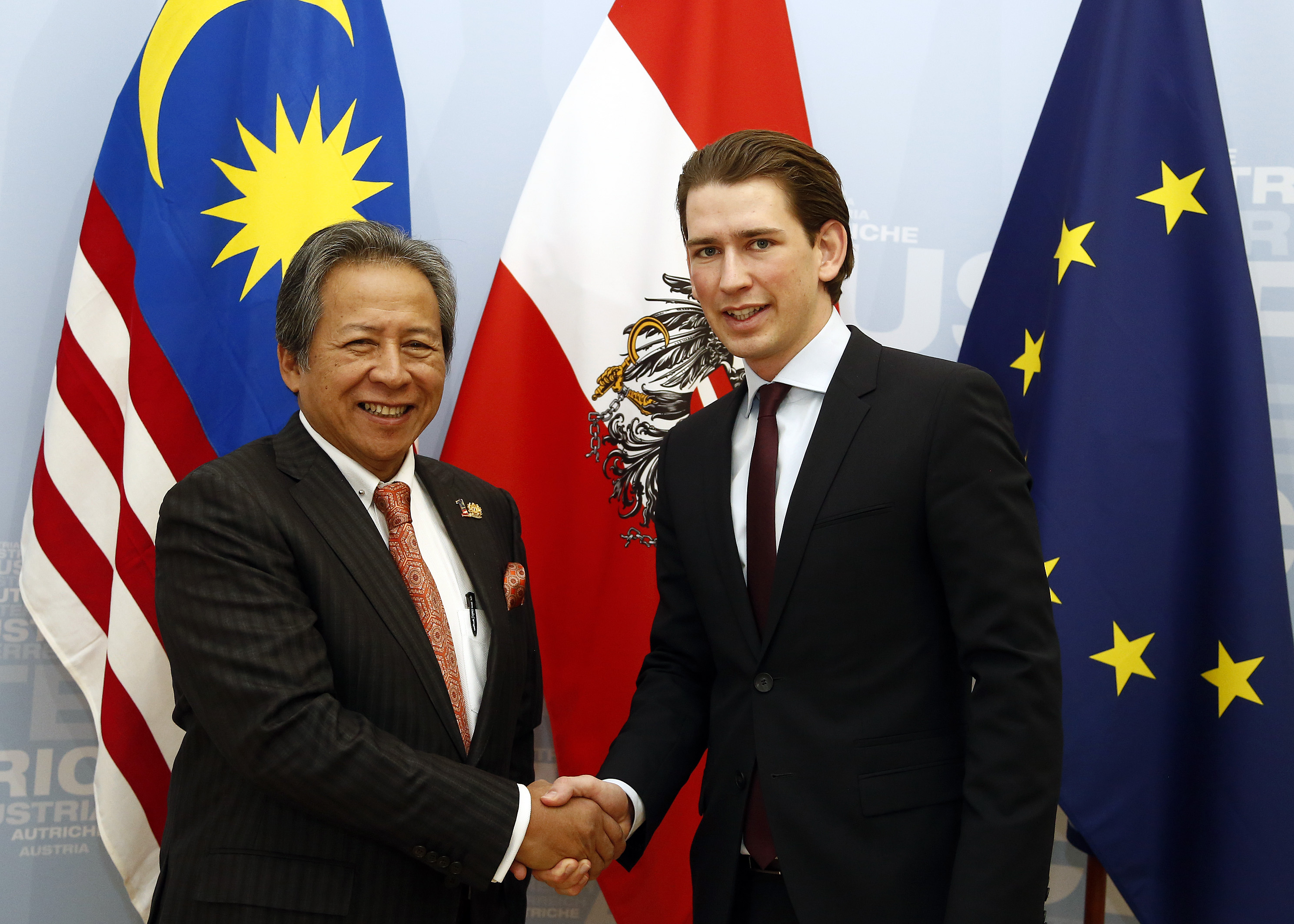 Außenminister Sebastian Kurz empfängt den Aussenminister von Malaysia, Dato Sri Anifah Aman, zu einem Gespräch. Wien, 11.03.2014, Foto: Dragan Tatic